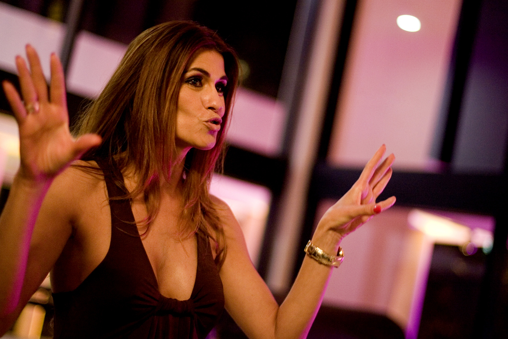 Gala de aniversário do Casino Estoril.